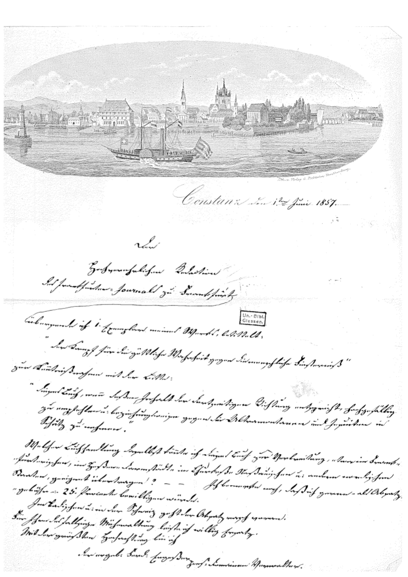 Brief Johann Evangelist Engessers, mit freundlicher Erlaubnis der Universitätsbibliothek Gießen. Signatur: Gießen, Universitätsbibliothek, Nachlass Lorenz Diefenbach, Briefe